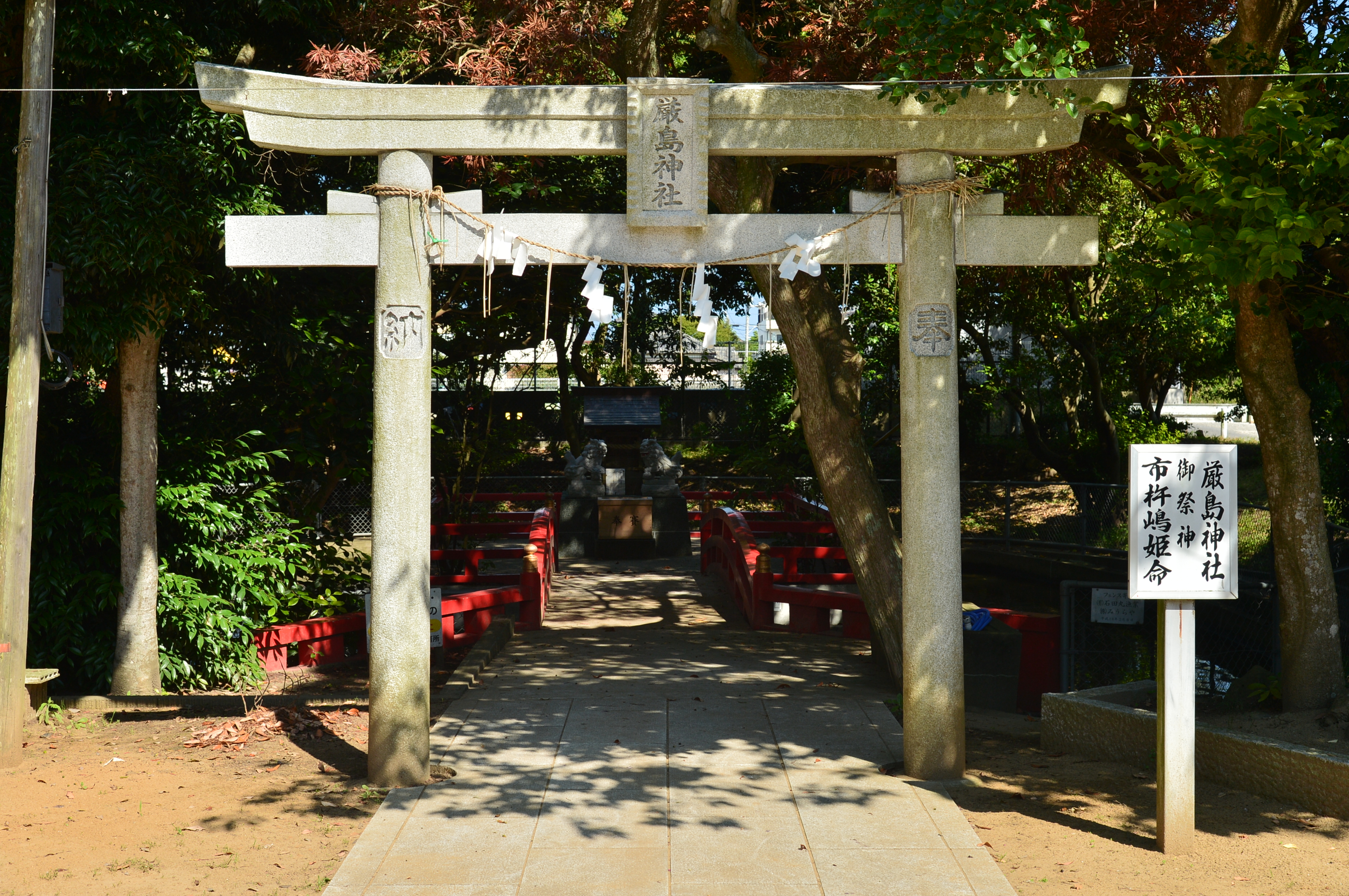 手子后神社境内の厳島神社（茨城県神栖市）